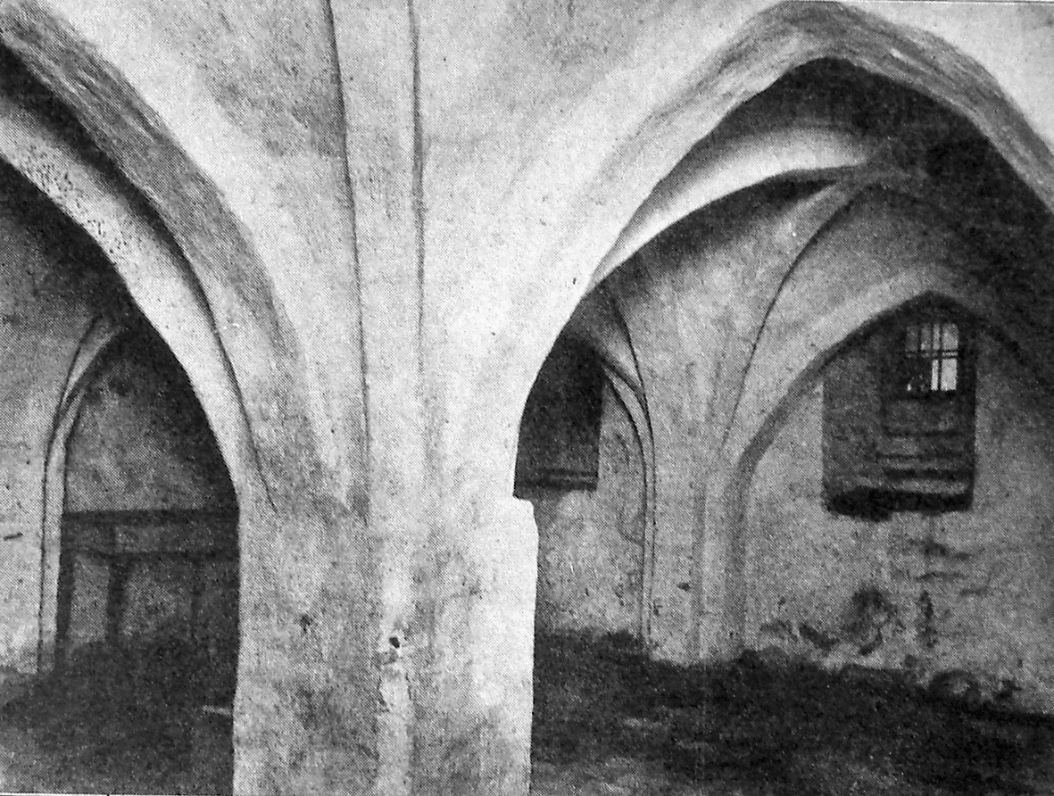 Kokkedal Slot i Torslev Sogn, (Øster Han Herred, Hjørring Amt) Kælder under vestfløjen.